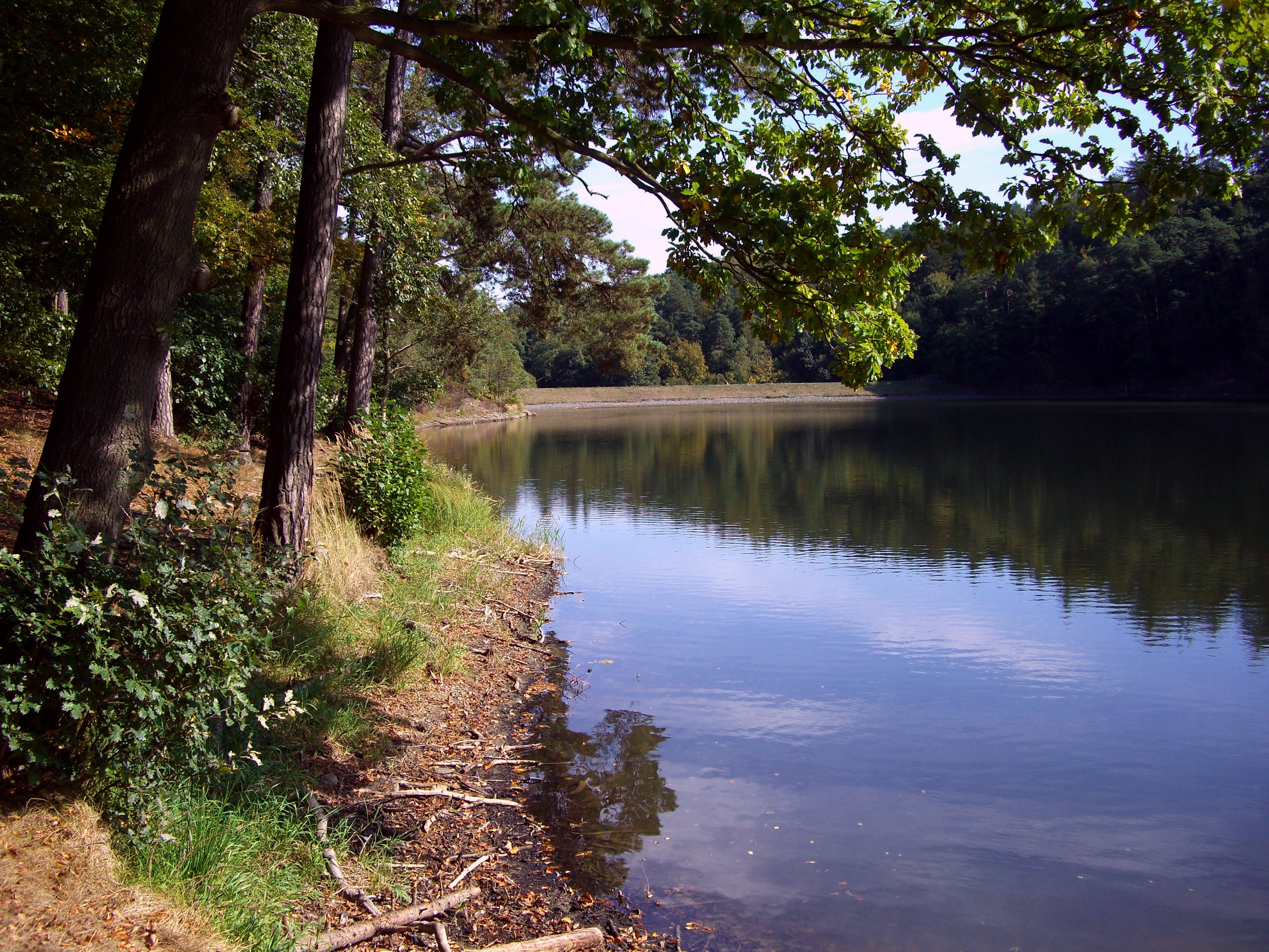 Kunstteich